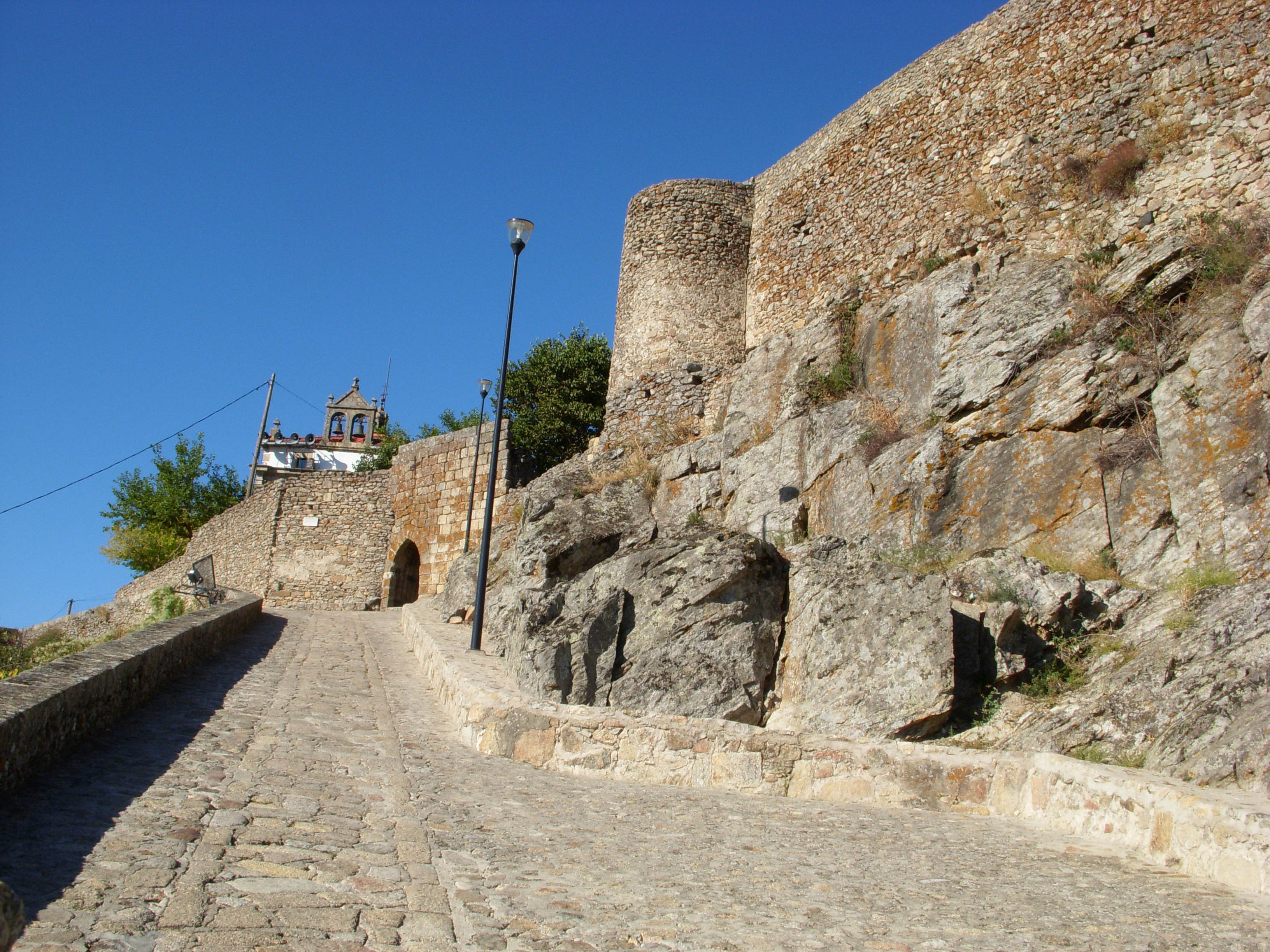 El Castillo está coronado por el Monte Viejo (Montancil o Monte Tances). Considerables pendientes y frecuentes quiebros de sus calles. Sierra Altitud: 734 m. Situación: 39.225658 -6.154807 Distancia: 48 Km de Cáceres. Rumbo: 97º E Comarca: Comarca de Montanchez. Mancomunidad: Sierra de Montanchez. Pueblos cercanos: Abalá del Caudillo, Torre de Santa María, Zarza de Montanchez, Valdemorales, Almoharín, Arroyomolinos, Alcuescar, Casas de Don Antonio Alrededores cercanos: EL QUEMADO, RECUERA, NACIMIENTO DEL RIO SALOR, el pocito, prado barbudo, el hornillo. GOOGLE MAPS ESPAÑA BUSCAR POR Mapas creados por los usuarios 109111079184700244089